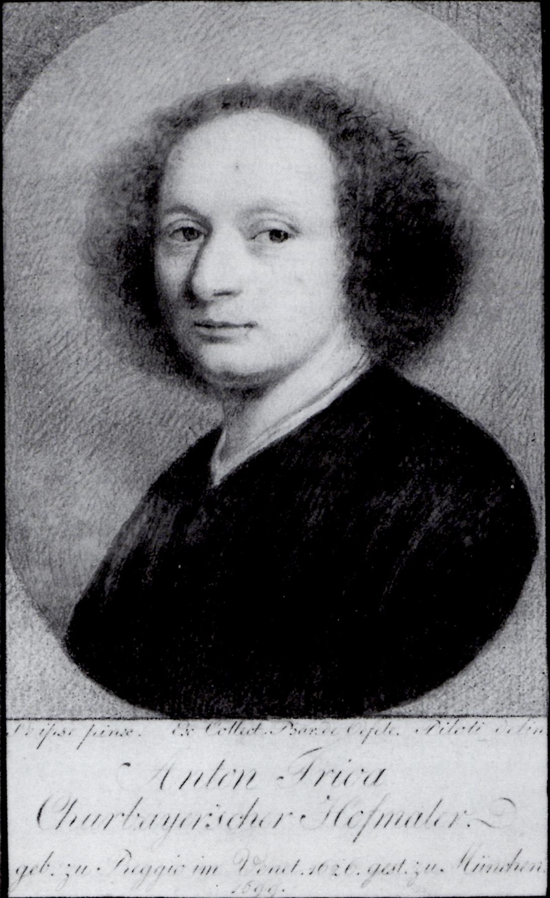 Antonio Domenico Triva (1626-1699), Copia di Ferdinand Piloty